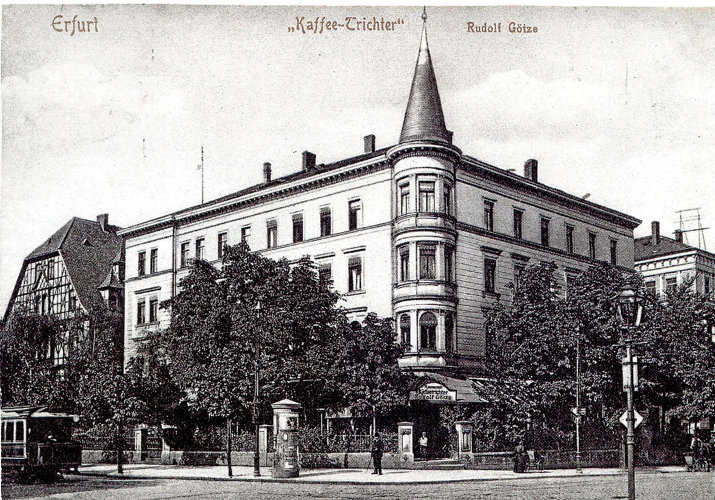 Kaffeetrichter Erfurt um 1920